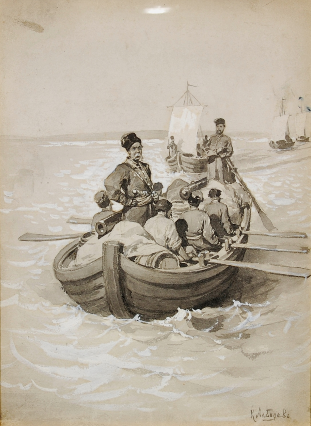 Die Expedition Semjon Iwanowitsch Deschnjews 1645 oder 1648